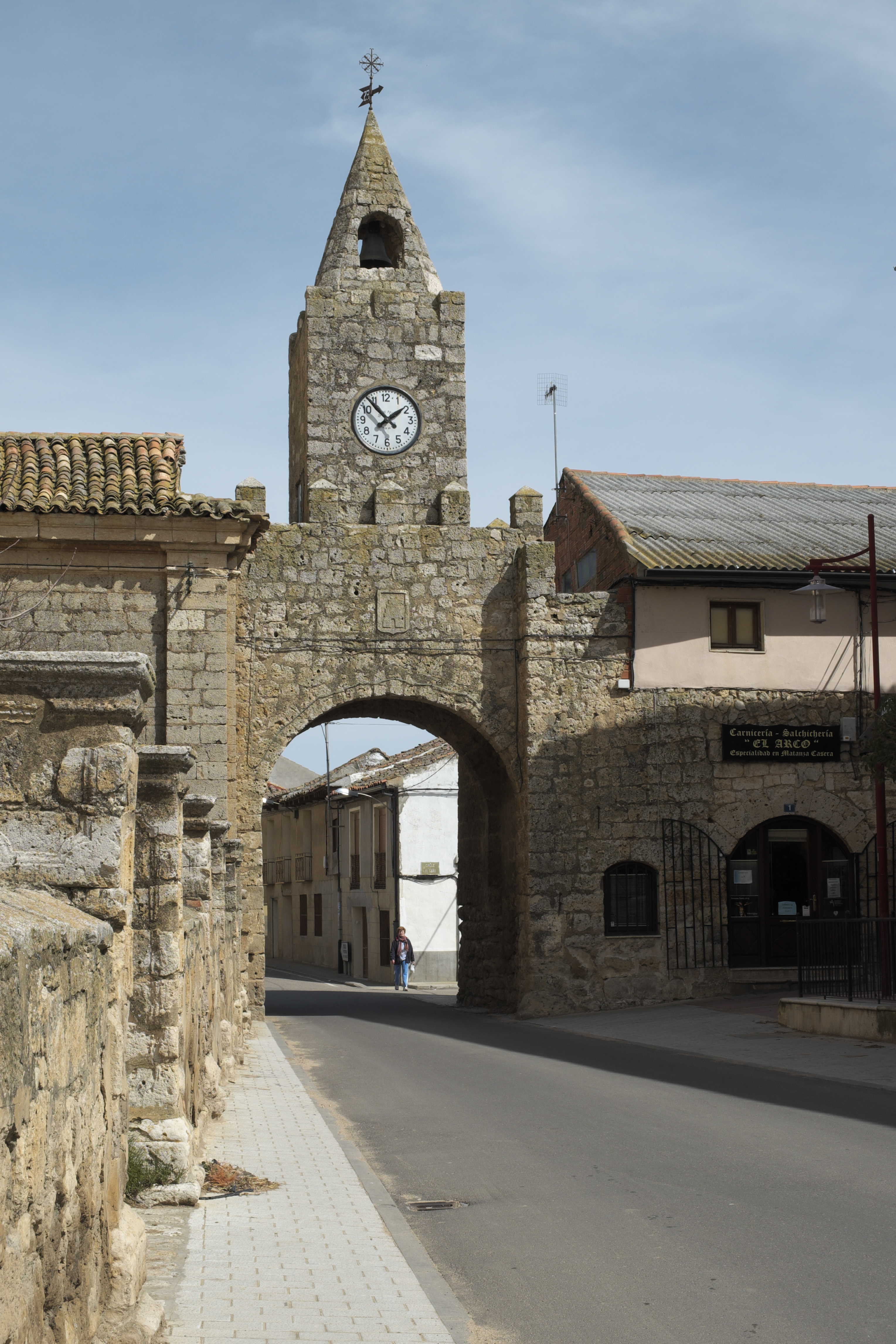 Stadttor in Villabrágima in der Provinz Valladolid (Kastilien-León/Spanien)